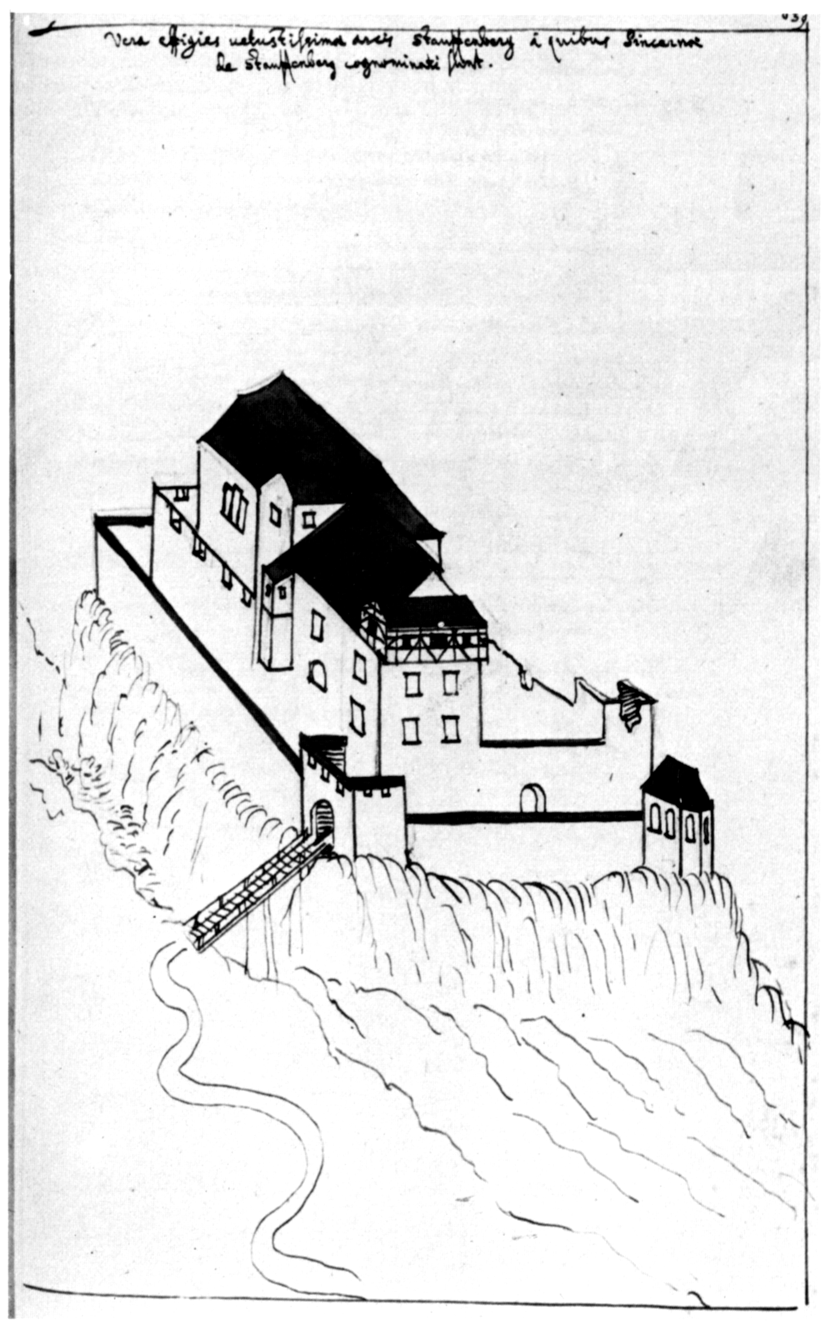 Burg Stauffenberg (abgegangene Stammburg der Schenken von Stauffenberg bei Hechingen), aus: Württembergische Landesbibliothek, HB V 16 fol 455r